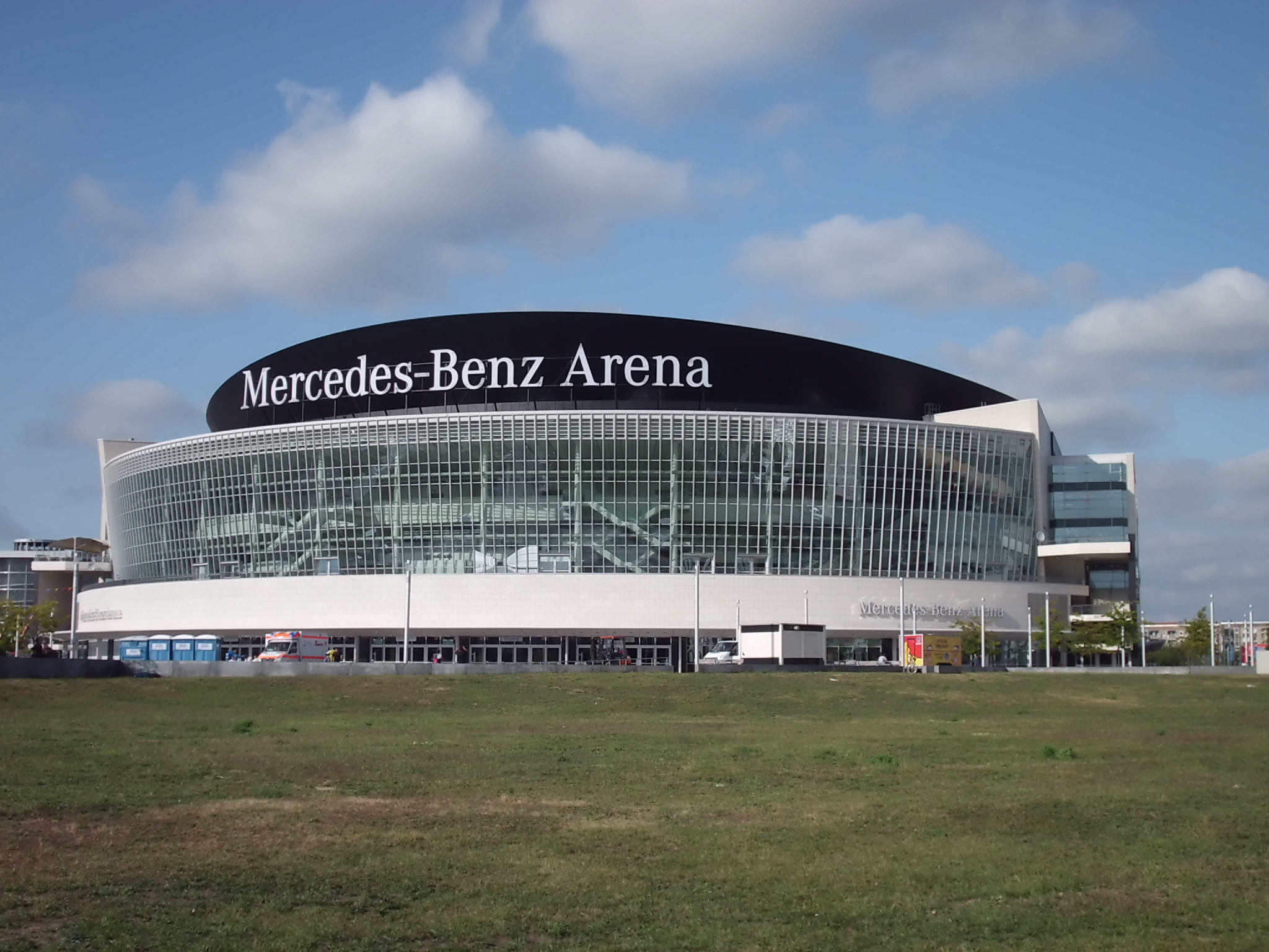 Mercedes-Benz Arena in Berlin; fotografiert von vorn rechts von der Mühlenstraße aus